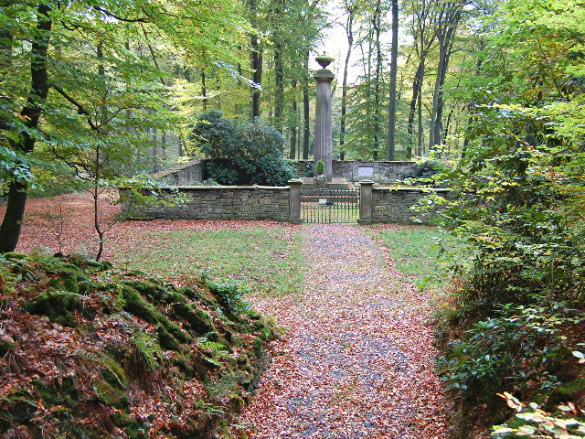 Blick vom Hauptweg zur Erbbegräbnisstätte der Familie Harkort, Schede, Herdecke This is a photograph of an architectural monument.